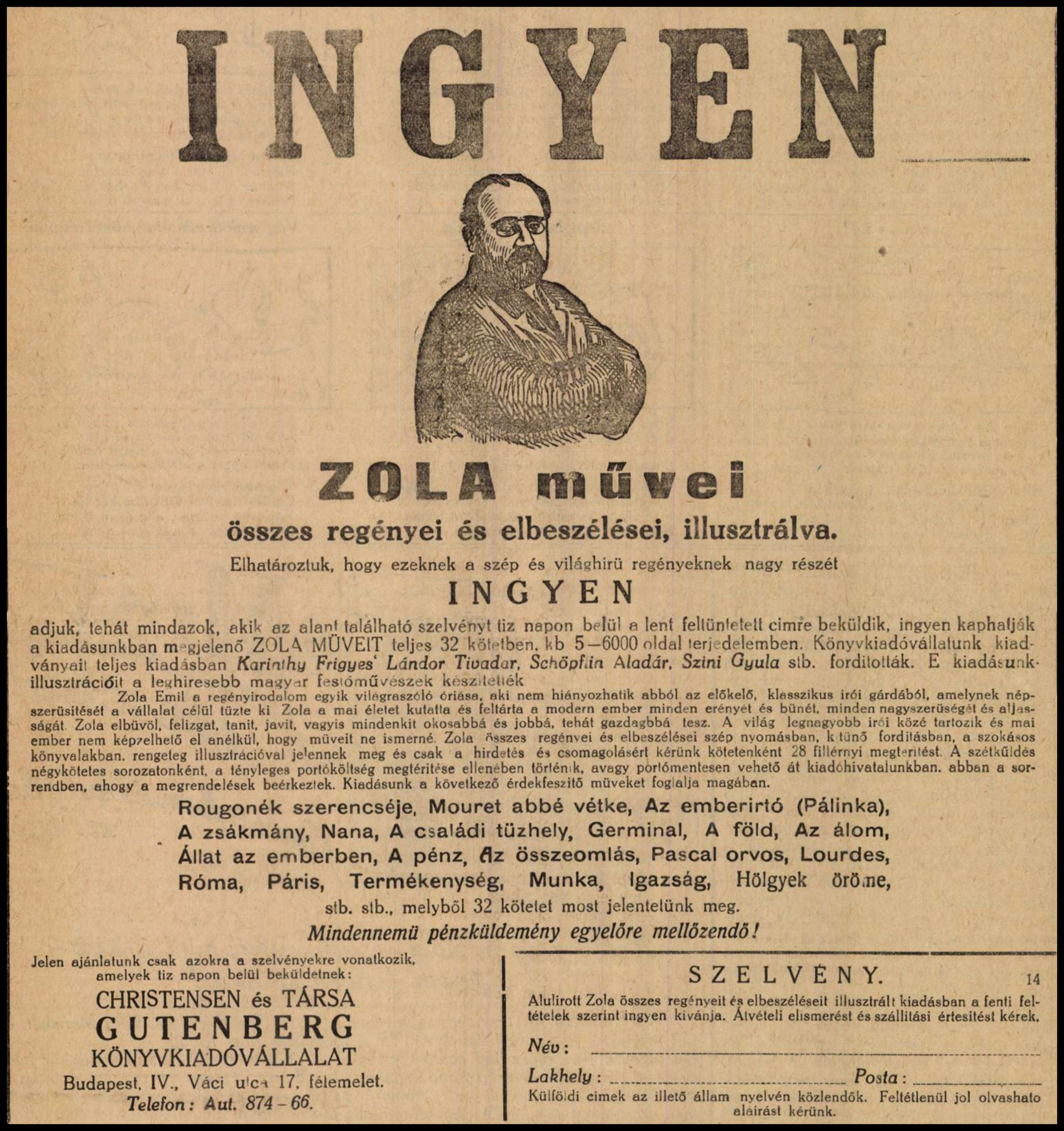 A Zola összes művei egy magyar könyvsorozat volt, amely Émile Zola műveit díszes kötéssel és bevezető tanulmányokkal ellátva jelentette meg 1929–1932 között 32 kötetben